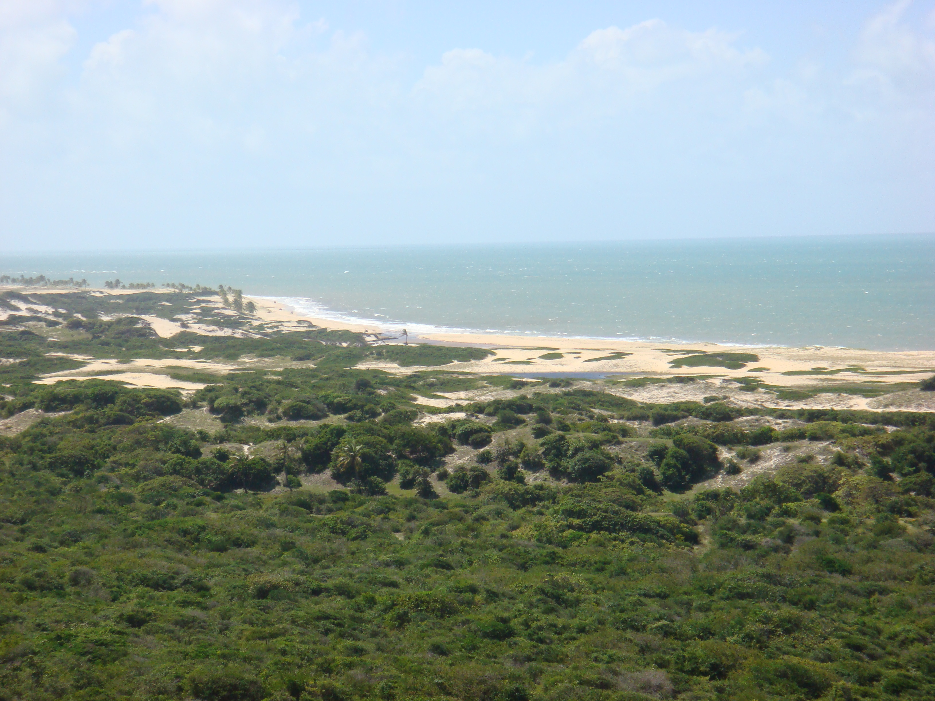 Imagem de uma pequena parte do grande litoral potiguar no Rio Grande do Norte, Brasil.